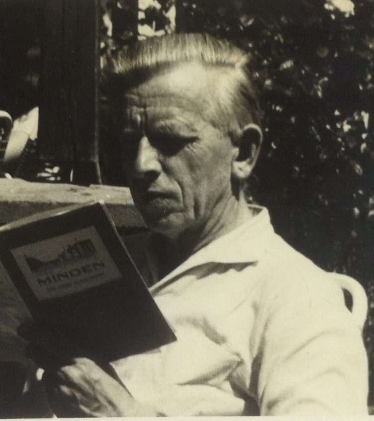 Walter Kaestner auf einem Familienfoto.